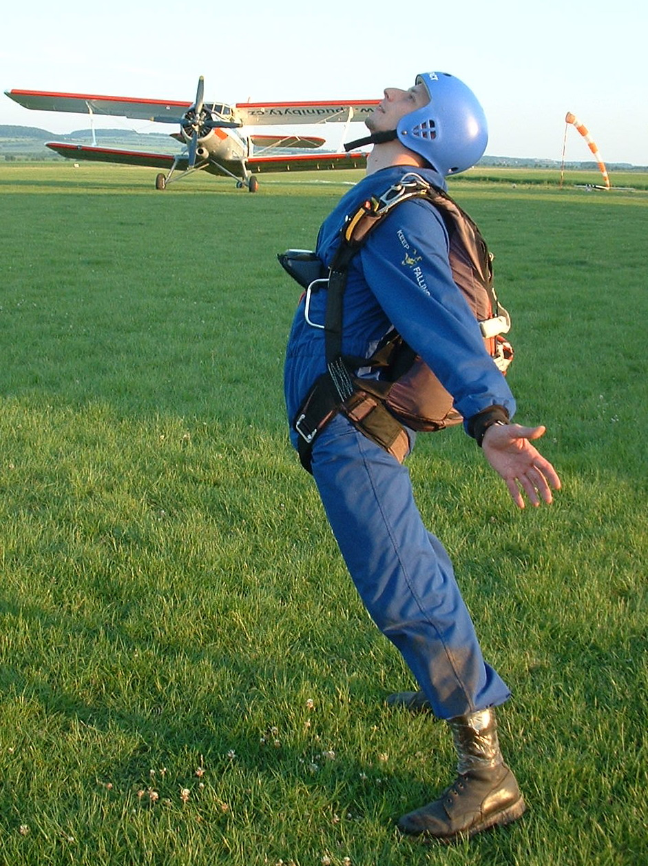 Poloha "Vlaštovka" kterou parašutista zaujímá při výskoku do volného pádu. Výrazné prohnutí těla stabilizuje ve vzduchu.